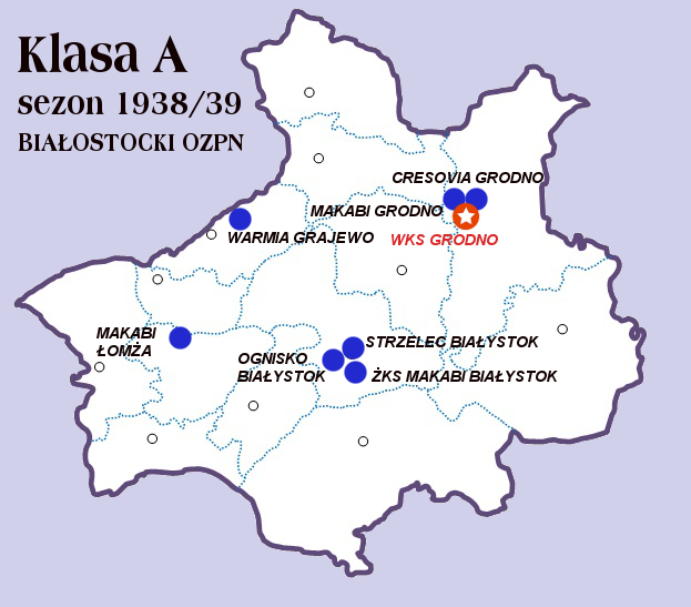 Klasa A Białystok 1938/39